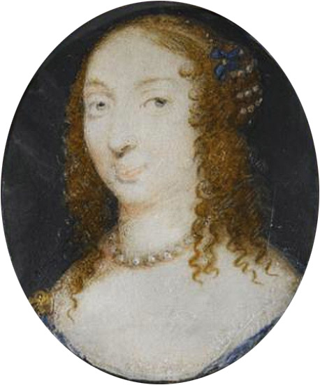 Marie de Hautefort, mariée au maréchal de Schomberg